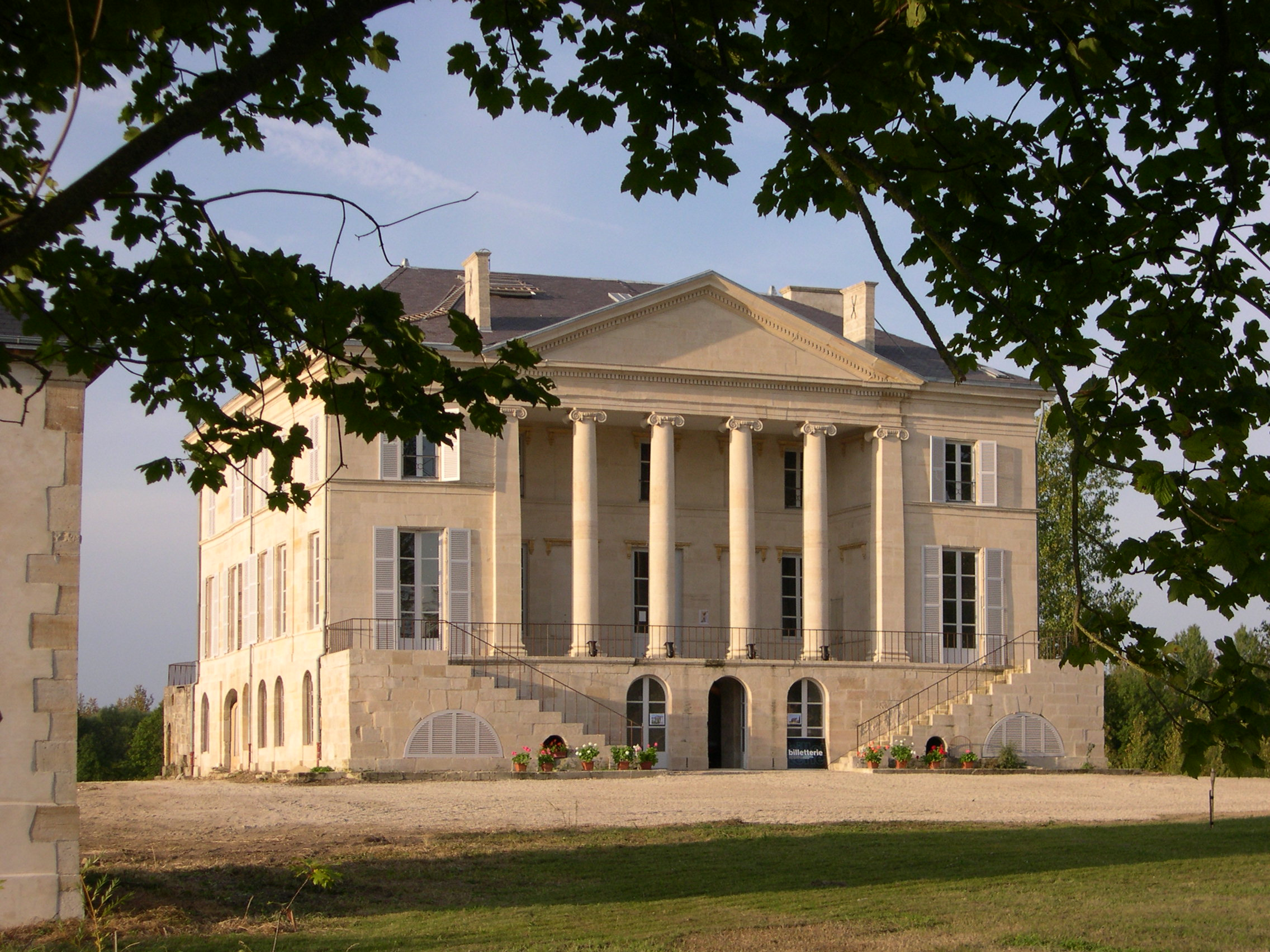 Château de Bignicourt-sur-Saulx (département de la Marne).